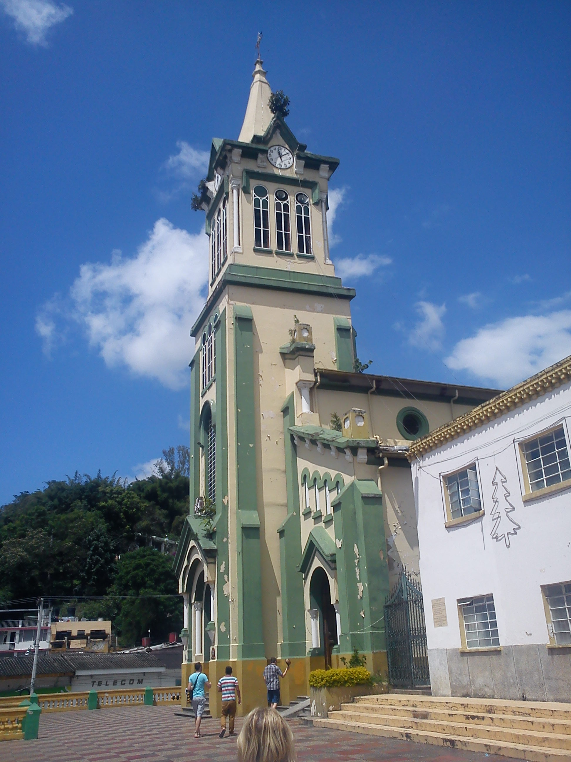 Nocaima - Kostel Panny Marie del Rosario de Chiquinquirá